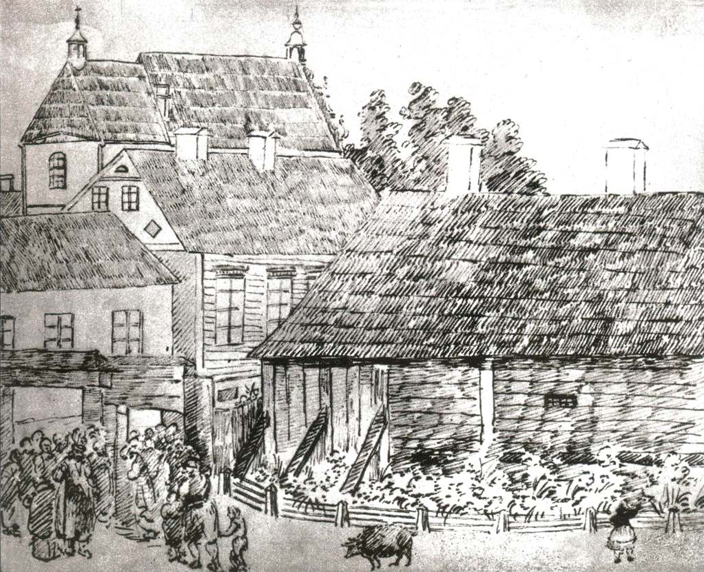 Беларуская (тарашкевіца): Менск (Miensk), вуліца Валоцкая (vulica Vałockaja). Дворык, удалечыні — касьцёл Сьвятога Тамаша Аквінскага